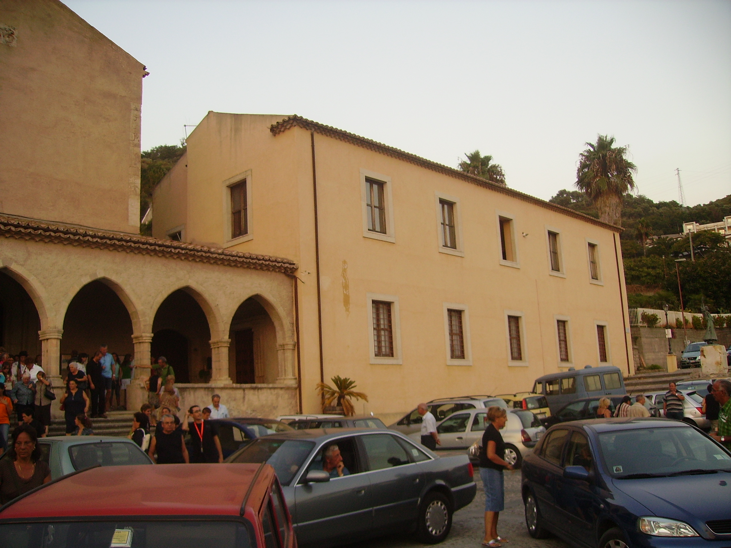 Convento di San Bernardino Amantea (CS)